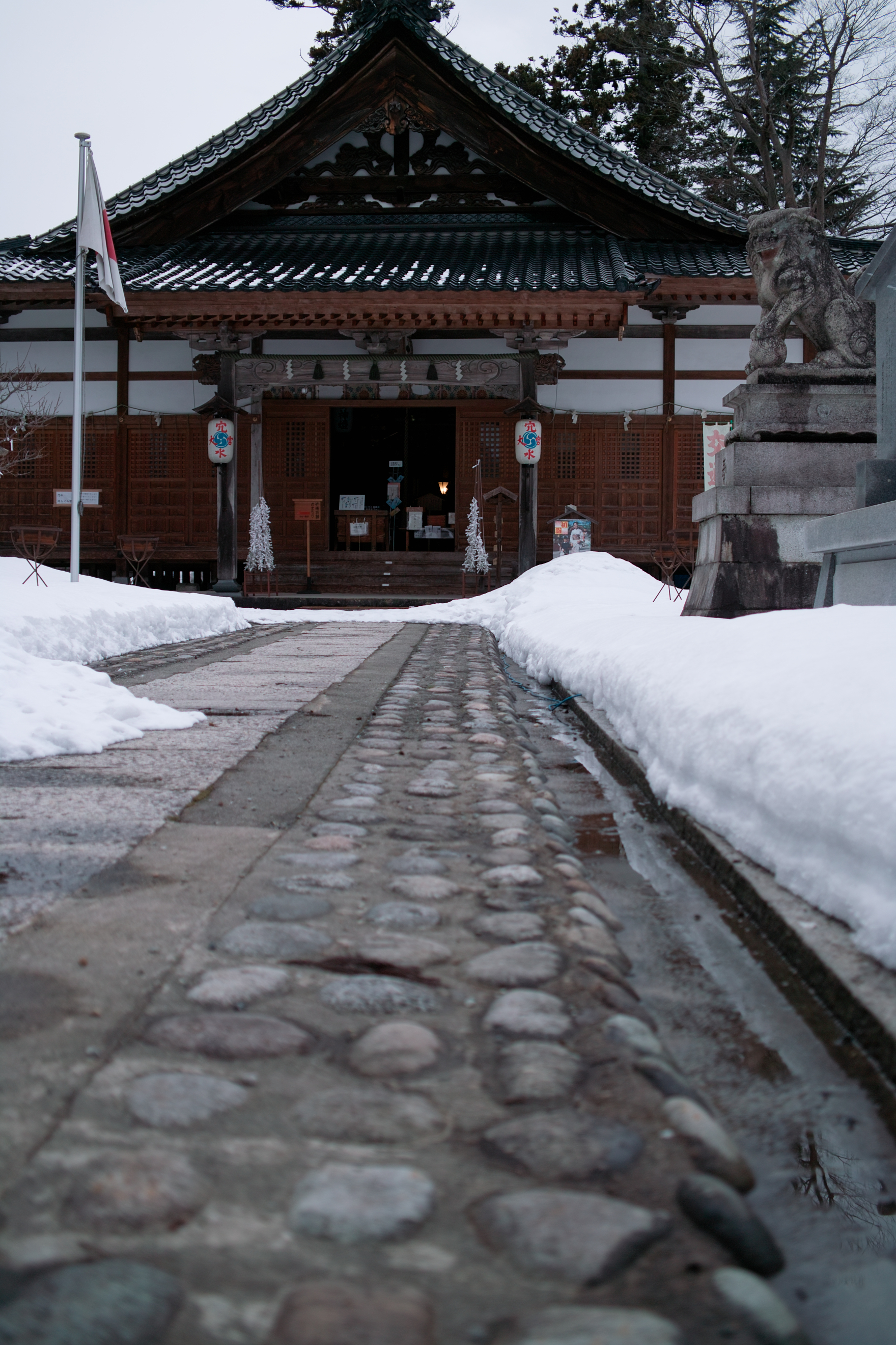 穴水大宮神社